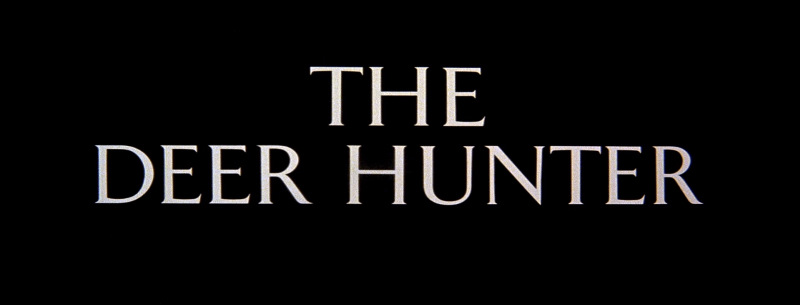 Logo of the film "The Deer Hunter" (1978)